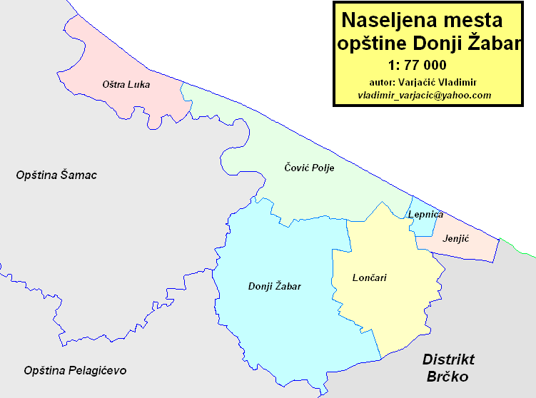 Opština Donji Žabar